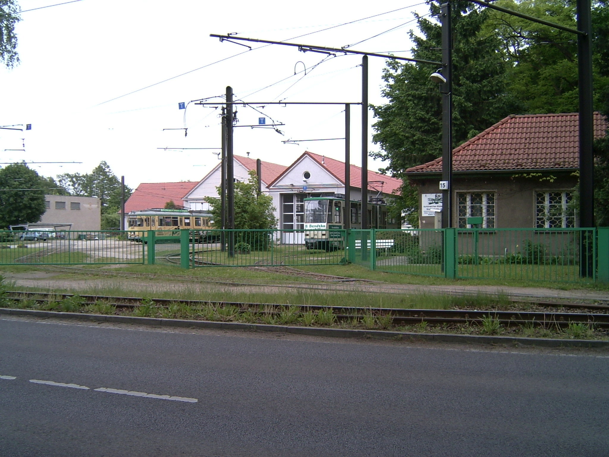 Depot/Betriebshof in Schöneiche.